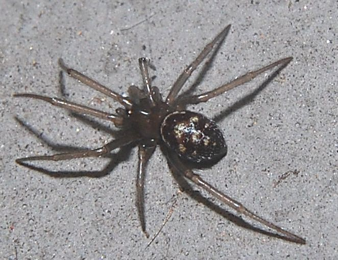 Steatoda grossa, juvenile; det. by K.-H. Kielhorn, Berlin